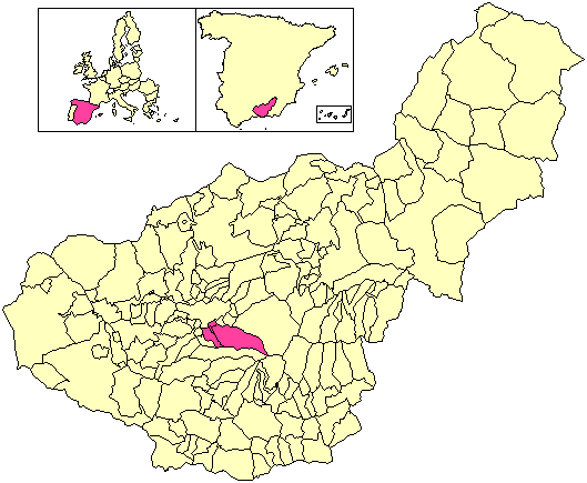 Situación de la Mancomunidad del Río Monachil respecto a la provincia de Granada, en España.